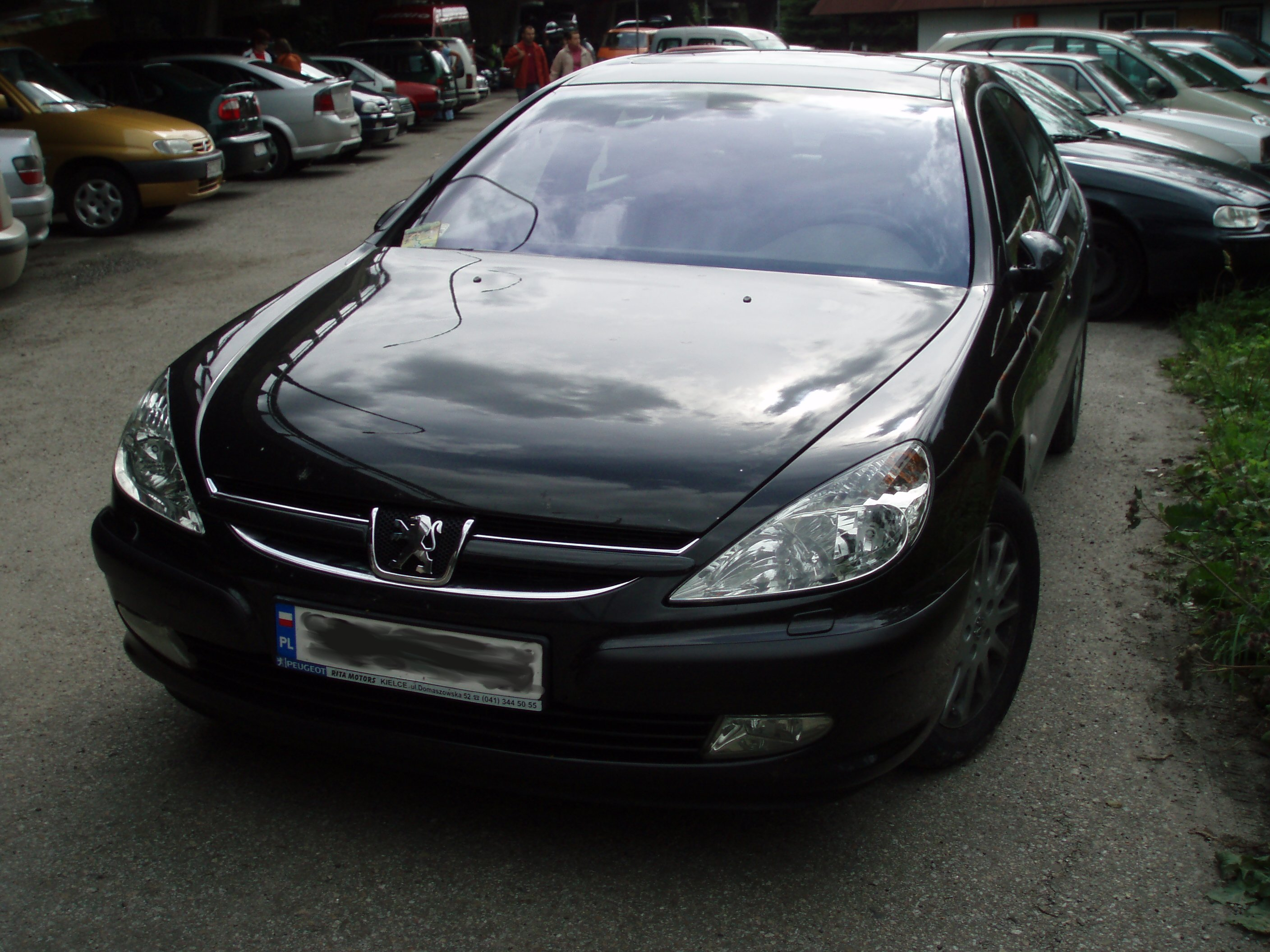 Peugeot 607